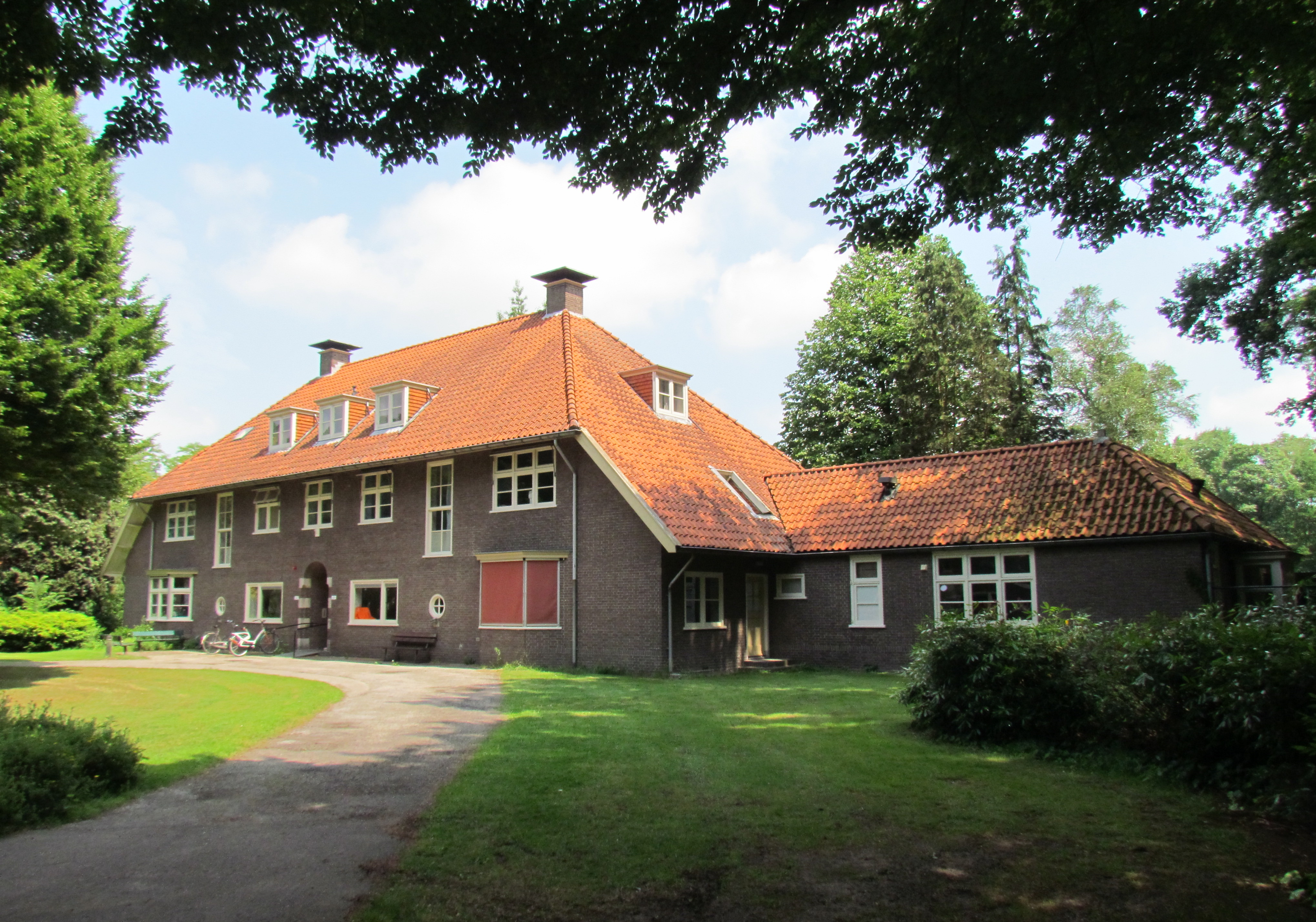 Het Apeldoornsche Bosch, jongenspaviljoen Naftali-Zebulon, later 'Bosduif'